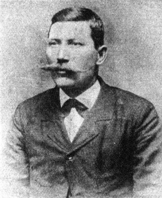 Österreichischer Politiker, Reichsratswahl 1907, Name siehe Dateiname